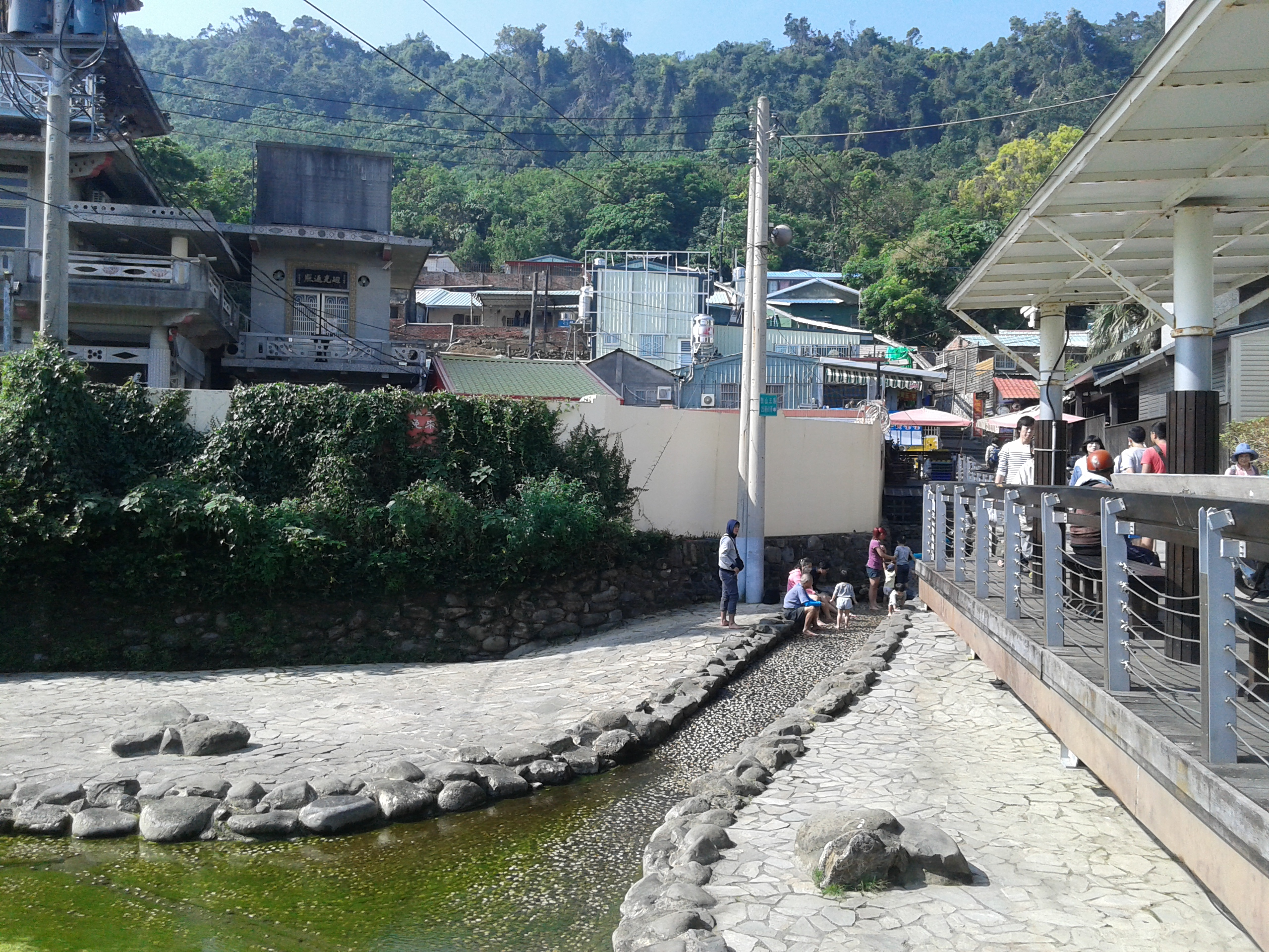 龍巖冽泉位於高雄市鼓山區的柴山登山口，曾是清末鳳山八景之一。